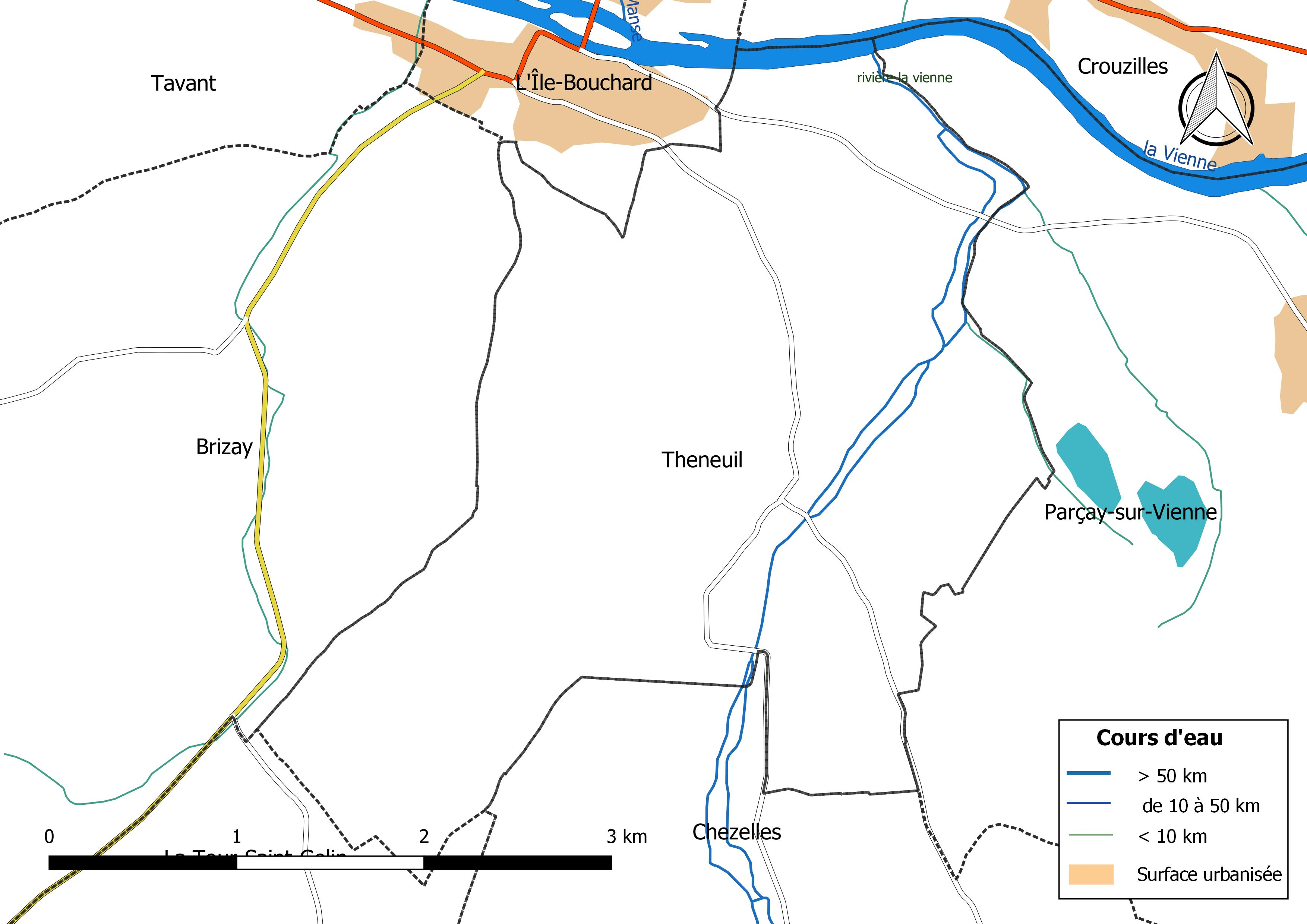 Carte du réseau hydrographique de la commune de Theneuil (France).